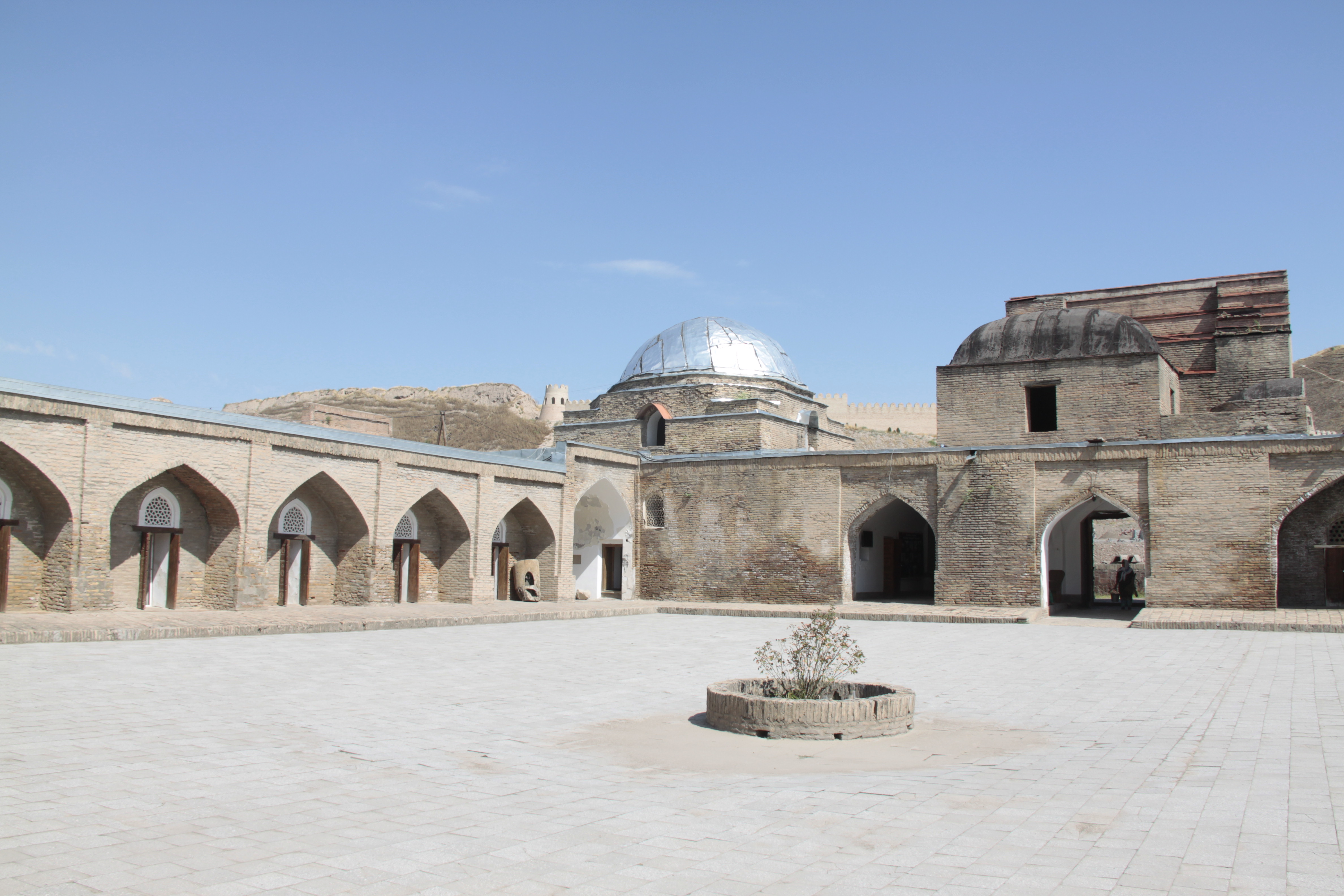 Тоҷикӣ: Мадрасаи кӯҳна. Қалъаи Ҳисор (3)